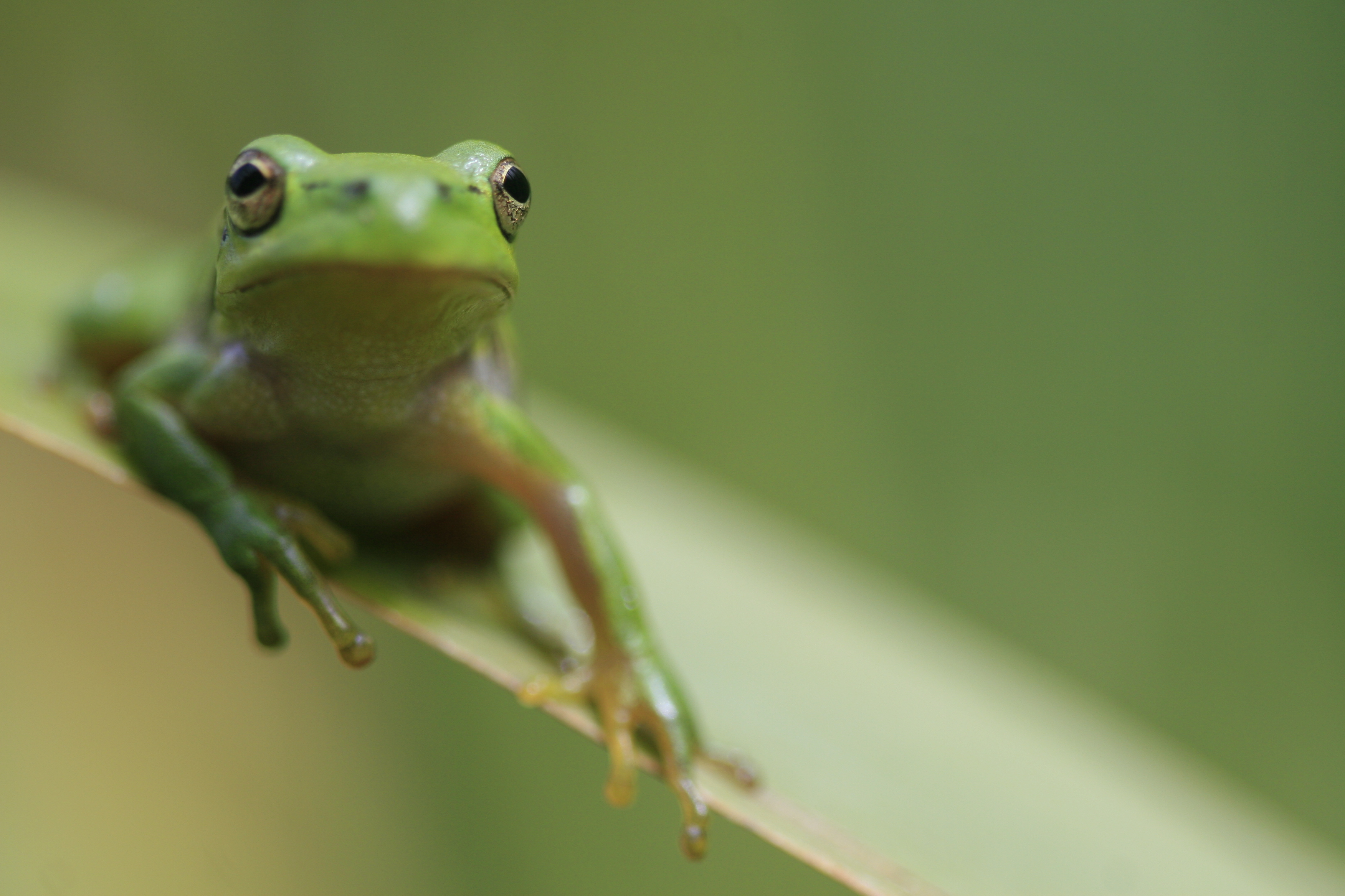 Hyla arborea